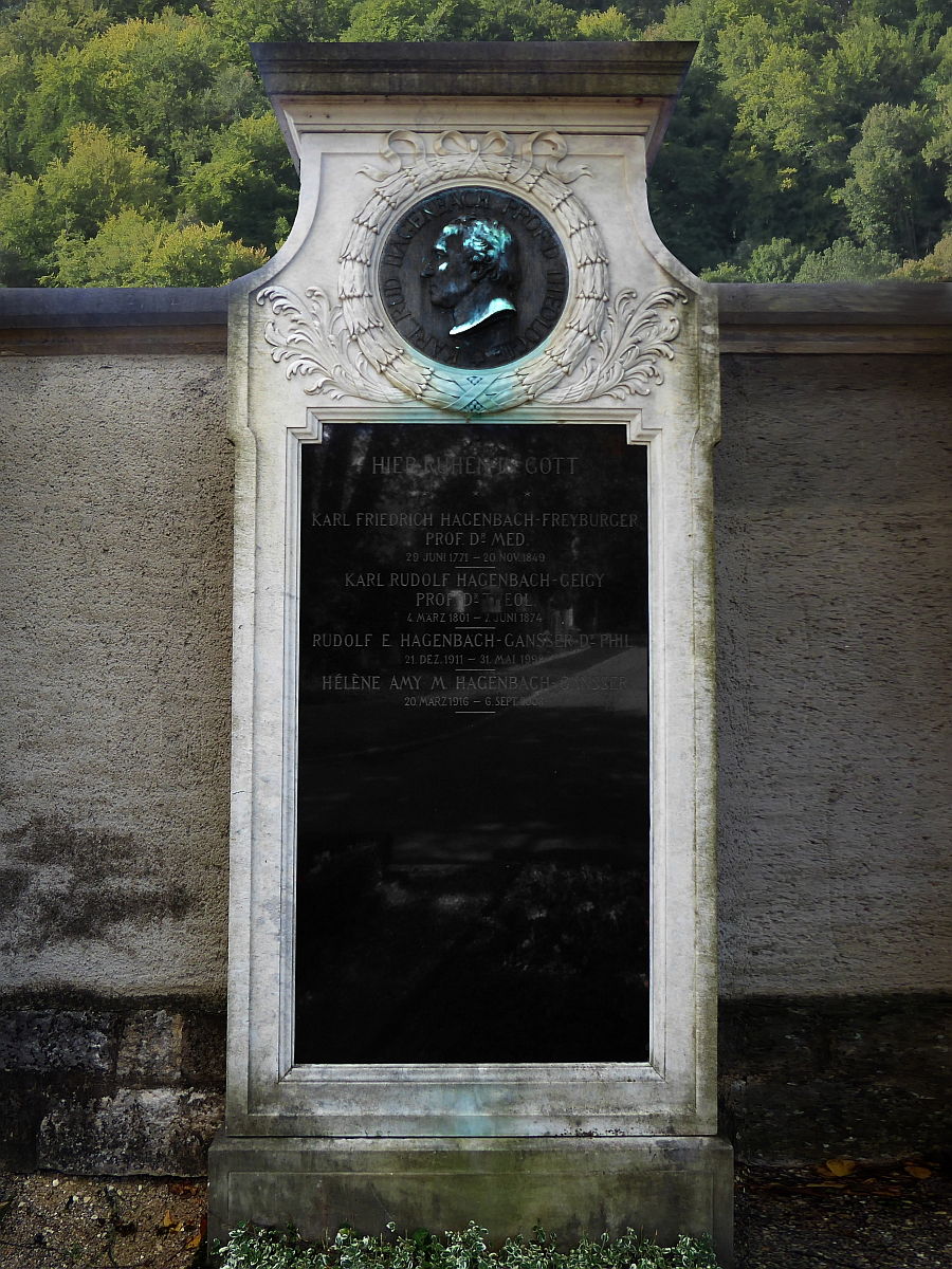 Karl Rudolf Hagenbach-Geigy (1801–1874) Prof. Dr. Theol., Grab auf dem Friedhof Wolfgottesacker, Basel